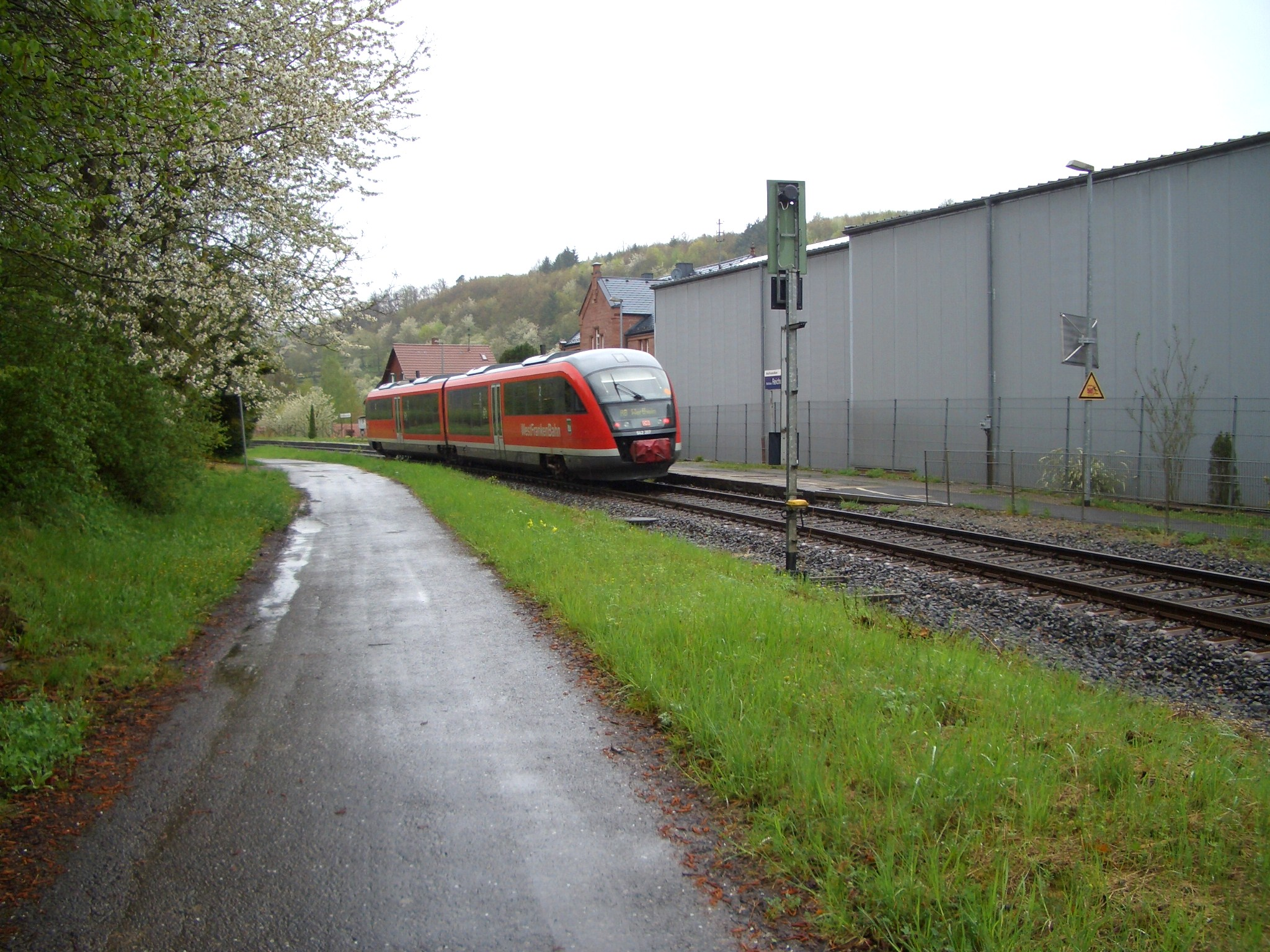 Haltestelle Reicholzheim (alt), mit Personenzug der Westfrankenbahn